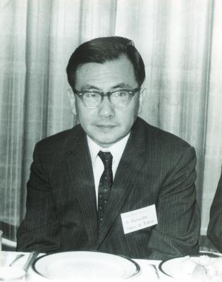 Kunihiko Kodaira in Tokyo